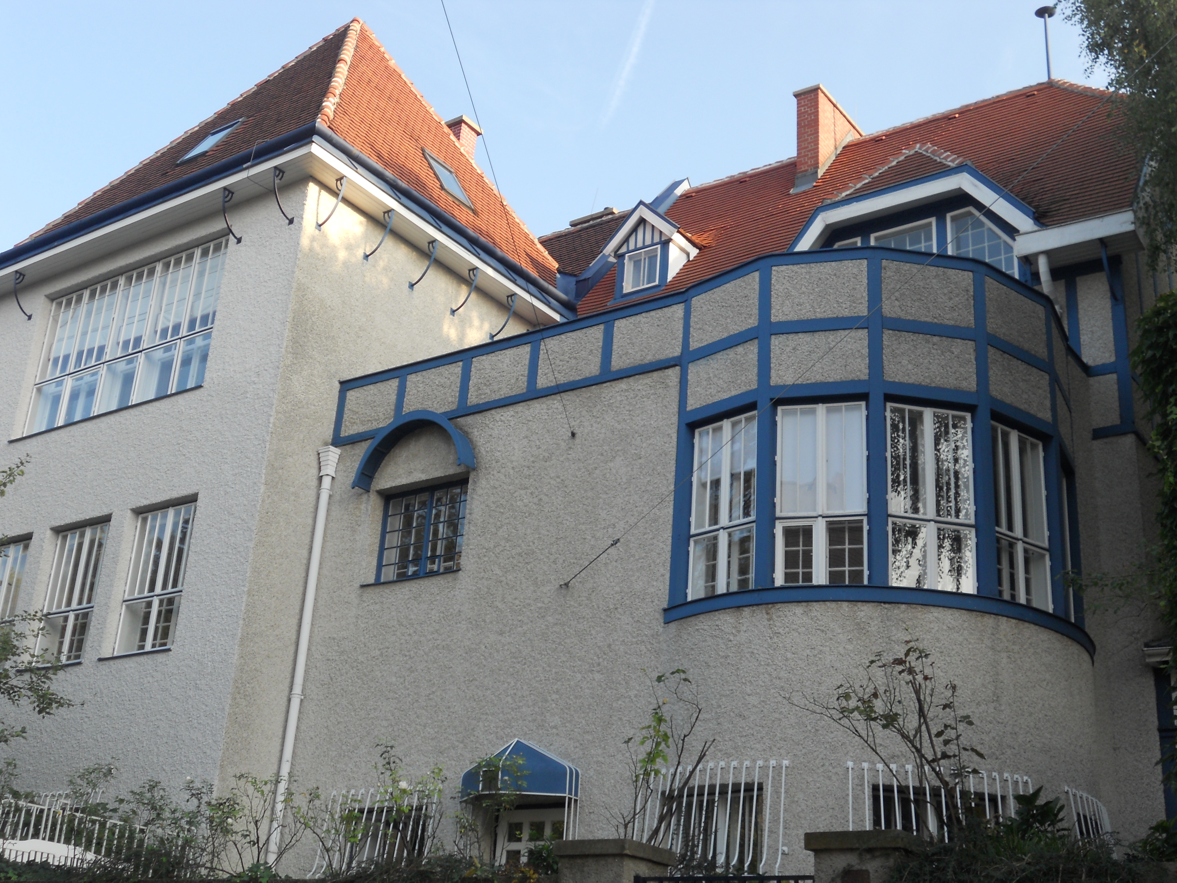 Haus Moser Moll, Steinfeldgasse 8 (=Geweygasse 13) in Wien, erbaut 1900/01 von Josef Hoffmann.